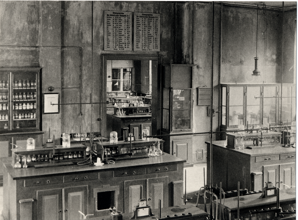 Labor im alten chemischen Institut der Bergakademie Freiberg, Arbeitstätte Clemens Winklers